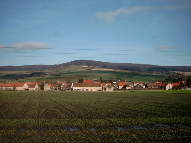 Blick über den Ort Thüste zum Thüster Berg mit dem Naturschutzgebiet „Südhang des Thüster Berges“ (NSG HA 140)